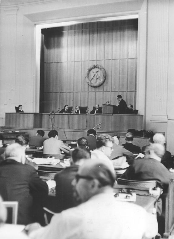 Oberstes Gericht, Globke-Prozess, Richterbank Zentralbild 19.7.1963 Globke-Prozess - Generalstaatsanwalt Streit hält Plädoyer. Mit dem Plädoyer der Anklage-Vertretung setzte der 1. Strafsenat des Obersten Gerichts der DDR am 19.7.1963 die Hauptverhandlung gegen den derzeitigen Bonner Staatssekretär Dr. Hans Globke fort. UBz: Übersicht während des Plädoyers von Generalstaatsanwalt Streit.